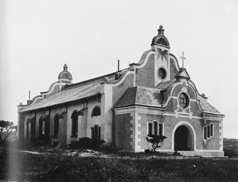 青岛督署小教堂01